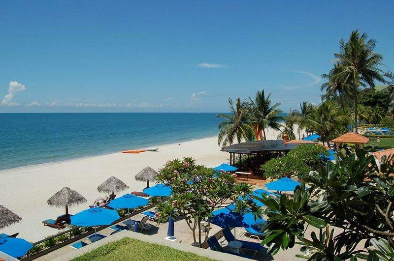 Kuantan Beach